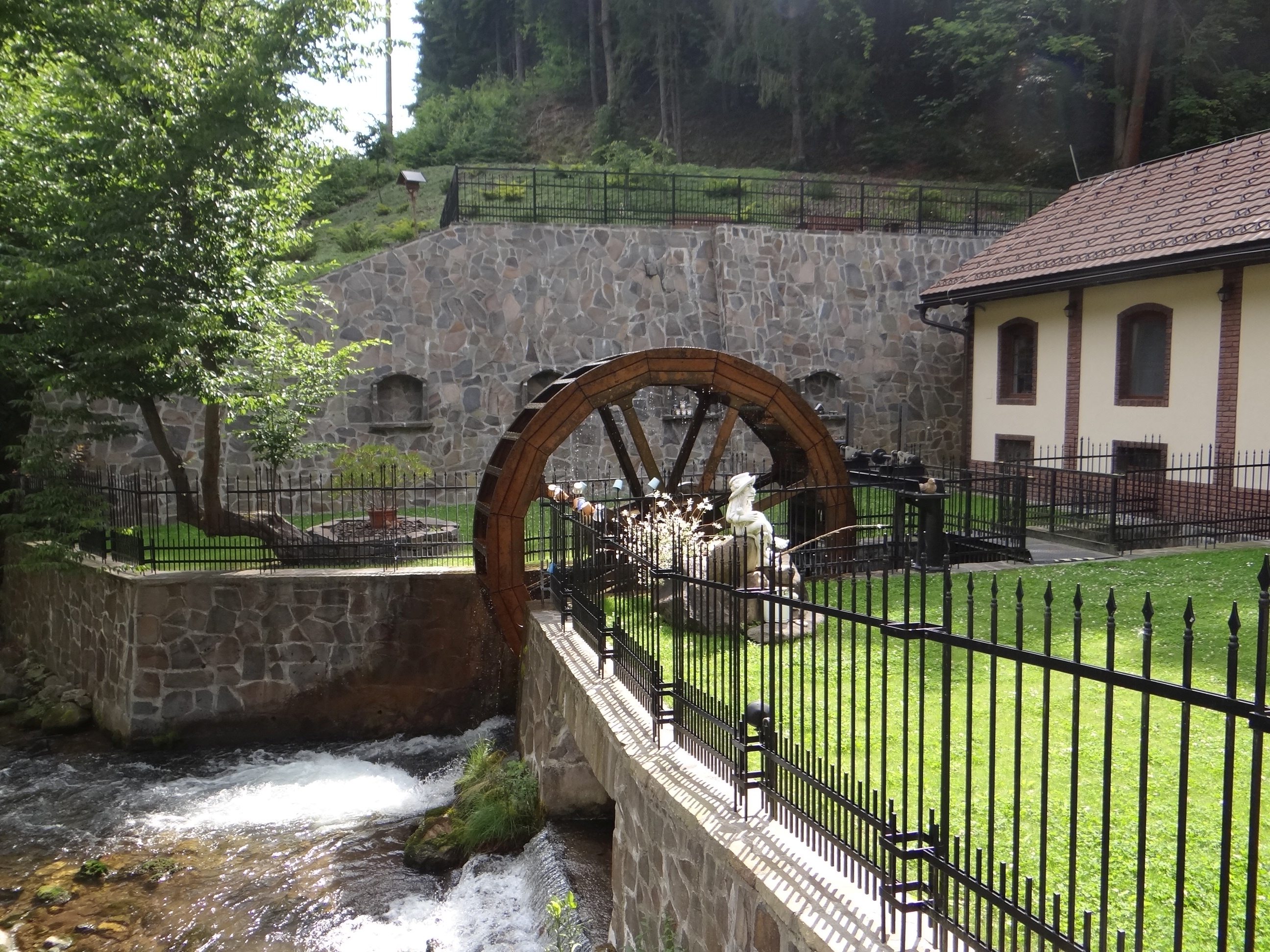 Harmanec